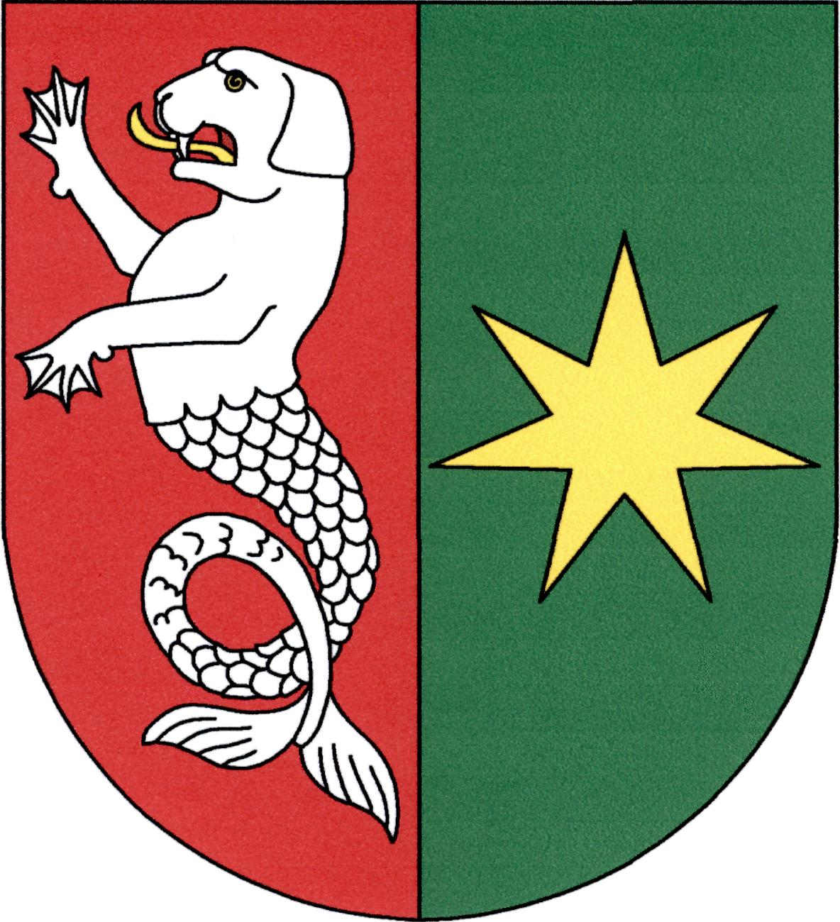 Znak obce Bezděkov (okres Havlíčkův Brod)